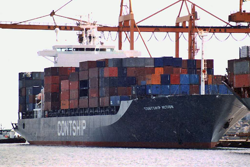 CONTSHIP ACTION in Piräus